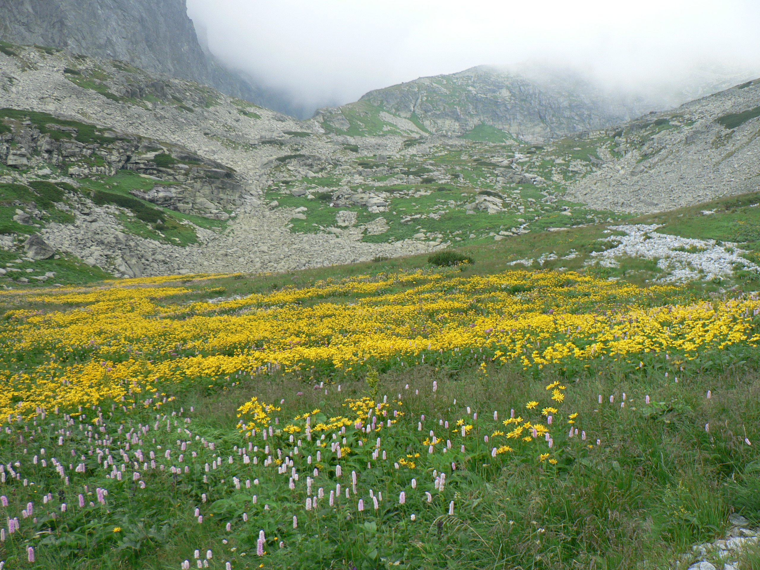 Wielicki Ogród w Dolinie Wielickiej, pośrodku Sucha Kopa